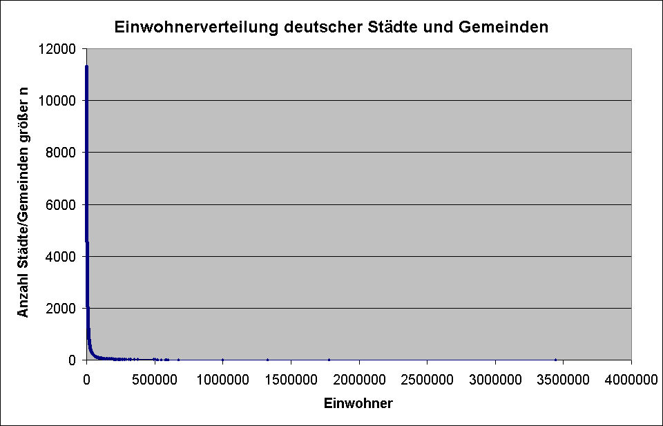 genauere Ausarbeitung von File:Powercitiesrp.png